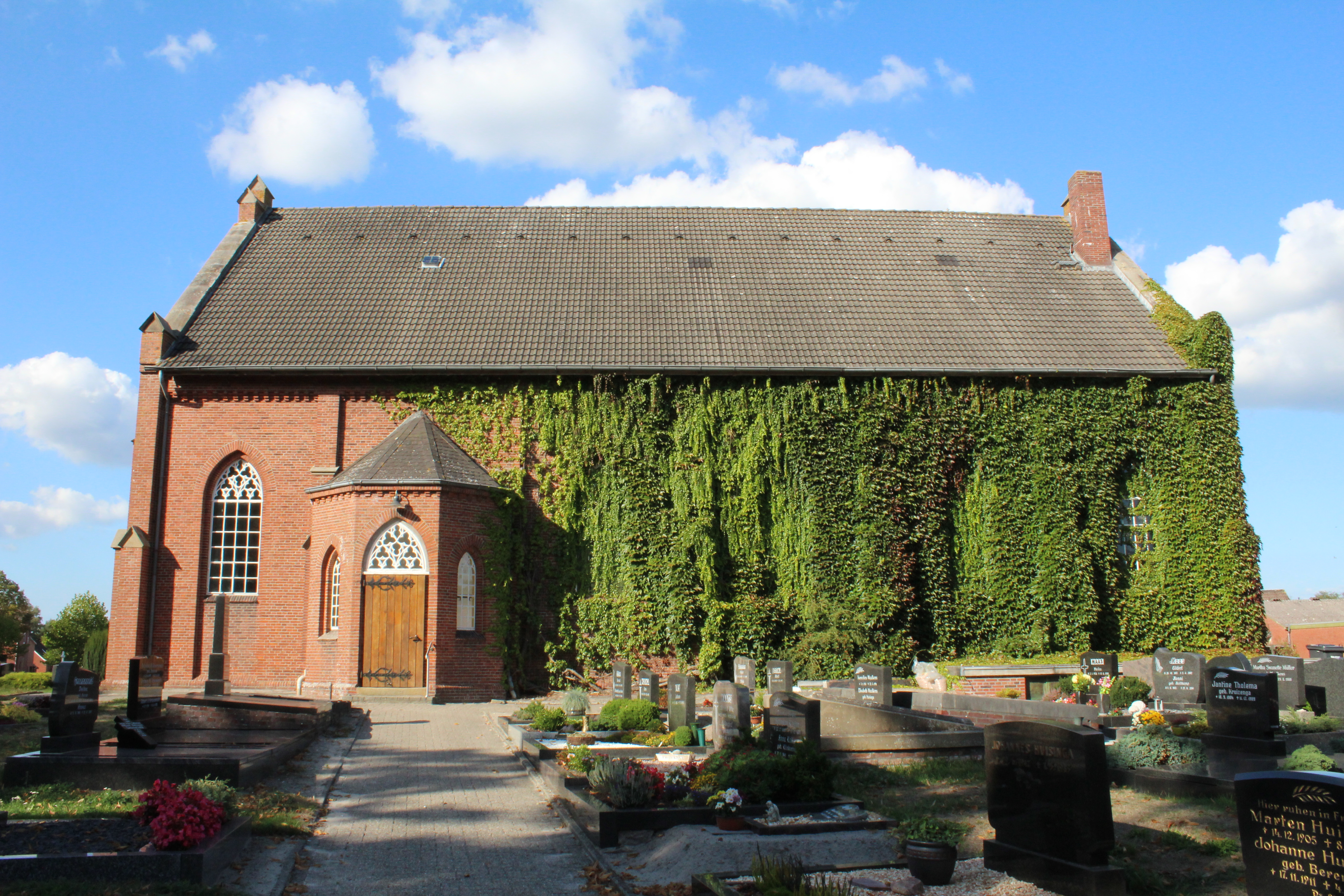 Evangelisch-reformierte Kirche Wymeer, Landkreis Leer, Niedersachsen, Deutschland